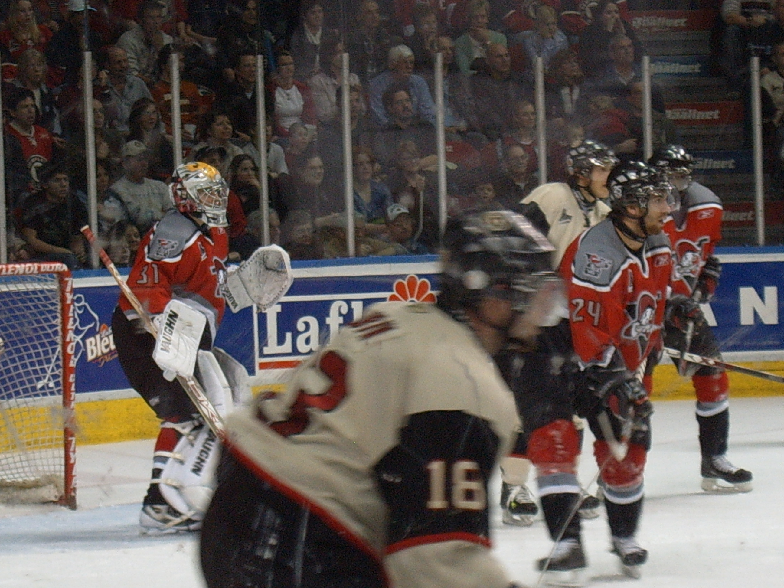 Action près du filet des Voltigeurs de Drummondville lors des séries éliminatoires de la LHJMQ de 2007 face aux Remparts de Québec.